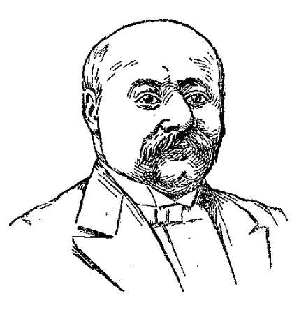 "Cornélius Hertz".